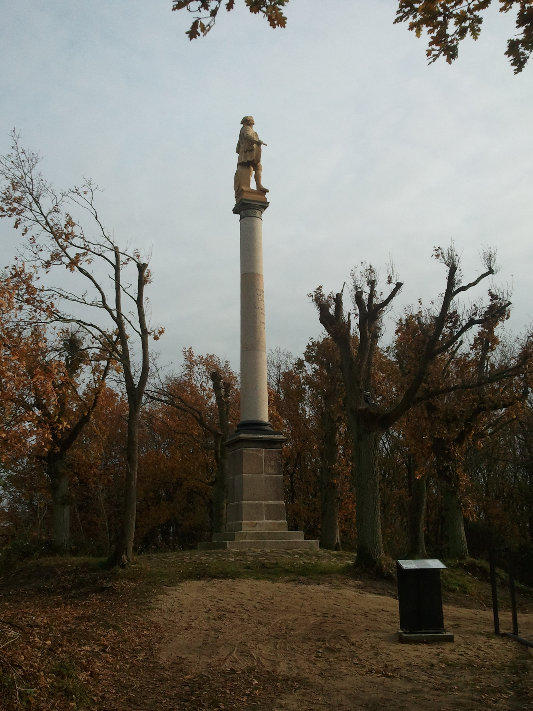 Groß Stresow, Landkreis Vorpommern-Rügen. Gedenksäule 15. November 1715